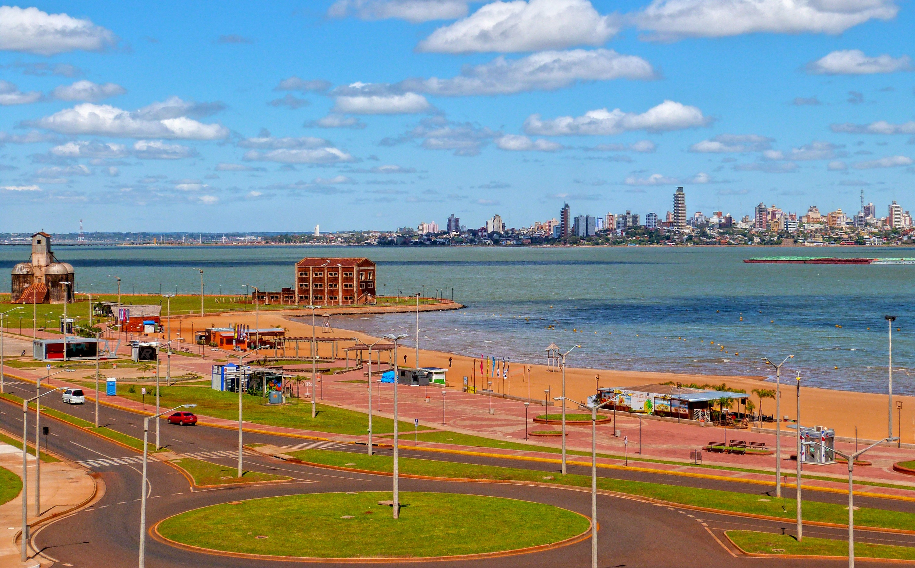 Vista parcial de la Costanera Sur frente a la Playa San José, al fondo se ven unos de los símbolos patrimoniales, el viejo Silo y el ex Molinos San José, mas el Río Paraná con la ciudad vecina Posadas Misiones Rca. Argentina.